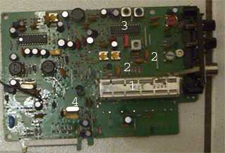 Tuner eines HK AVR41